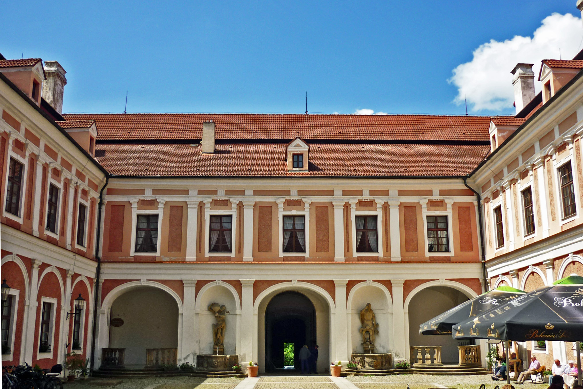 Schloss Rothenhaus bei Görkau in Nordböhmen (Červený Hrádek), Innenhof